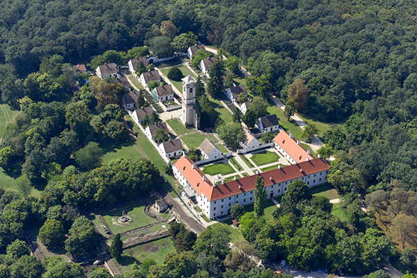 A majki kamalduli kolostor a levegőből